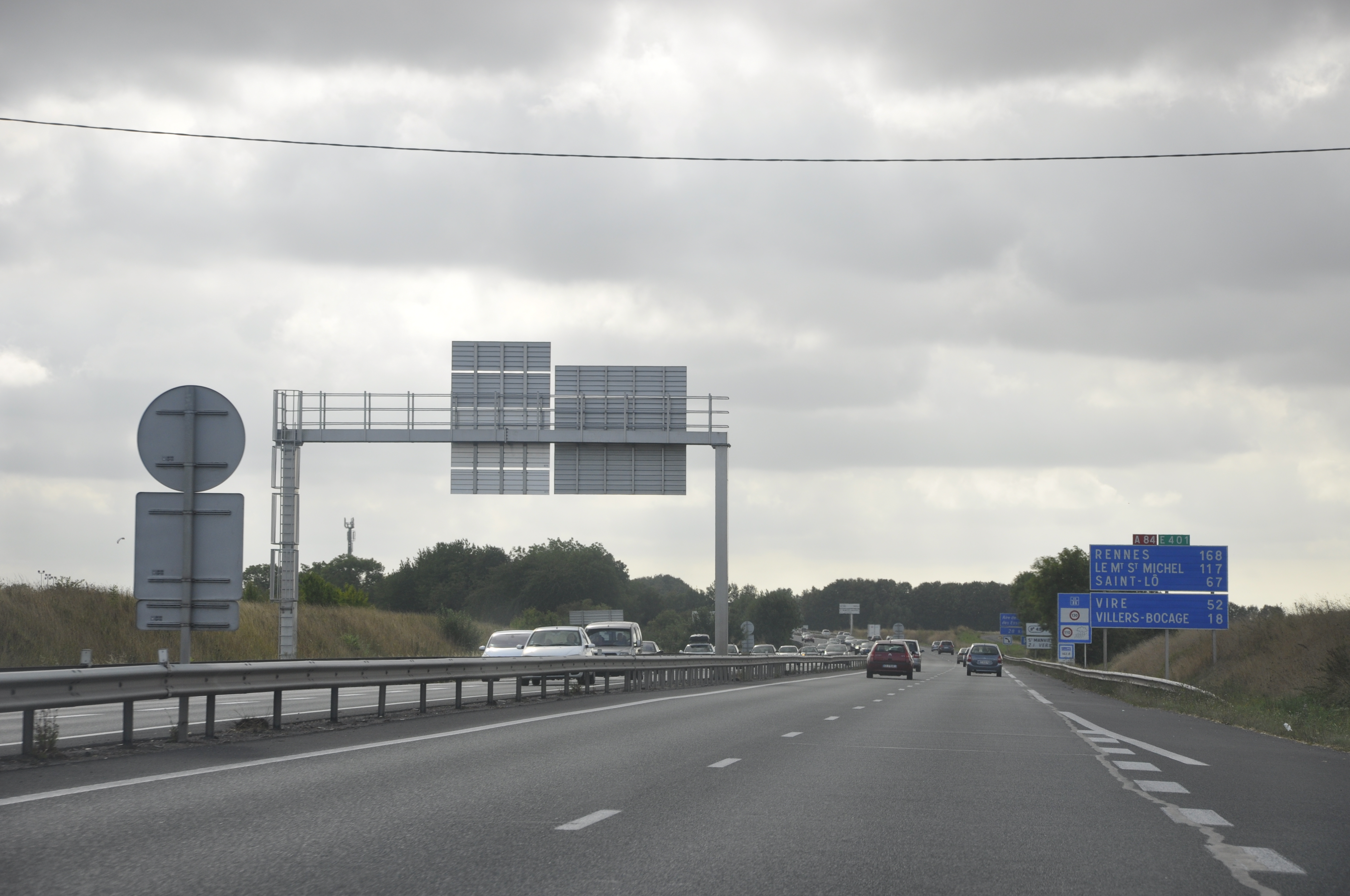 entrée de l'autoroute A 84 en direction de Rennes